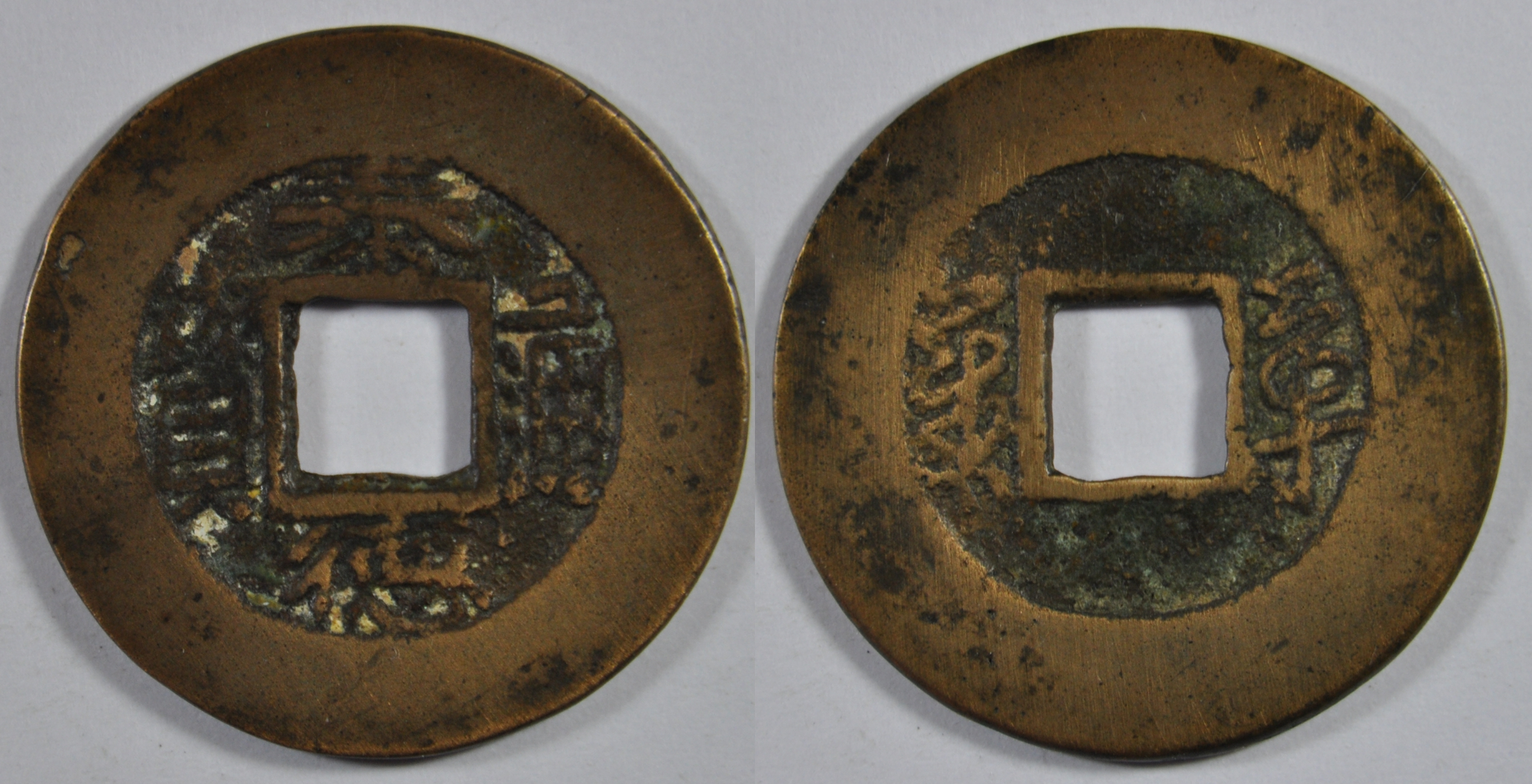 Une monnaie d'une sapèque en laiton de Nguyen Van Nhac ère Thai Duc (1778-1793), de la dynastie des Tay Son. (1778-1802) A/ Thai Duc thong bao (Monnaie courante de l'ère Thai Duc) R/ Van Tué (Dix mille années) Dimension : 24 mm Poids : 2,7 g. Remarque : La révolte des Tay Son (C'est le nom de leur village) commence en 1771. Il s'agit de 3 frères du clan de Ho (Hue, Lu et Nhac) qui prennent le nom de Nguyen. Ils sont aidés par les seigneurs Trinh qui gouvernent le Nord du Dai Viet. Ils finissent par vaincre les seigneurs Nguyen : ils prennent d'abord la ville de Qui Nhon (1773), près de leur village, puis la ville de Gia Dinh (Saigon) en 1776. Ils massacrent la famille Nguyen sauf un neveu, Nguyen Anh, qui se réfugie dans le delta du Mékong où il obtient l'appui des Siamois puis des Français. C'est lui qui fondera la dynastie Nguyen en 1802. En 1778, Nuguyen Van Nhac se proclame empereur. En 1780, l'armée Tay Son est attaquée par l'armée siamoise avec l'appui de Nguyen Anh mais en 1782, le roi de Siam, P'ya Taksin, est tué dans une révolte. Peu de temps après, c'est la victoire des Tay Son. En 1786, Nguyen Hue attaque la partie nord du pays contrôlée par les seigneurs Trinh. Rapidement, il les vainc. Référence : 1003 BNF (Catalogue des monnaies vietnamiennes, F. Thierry, 1987); MNIS 4504; Schr 461 Indice de rareté : Commune